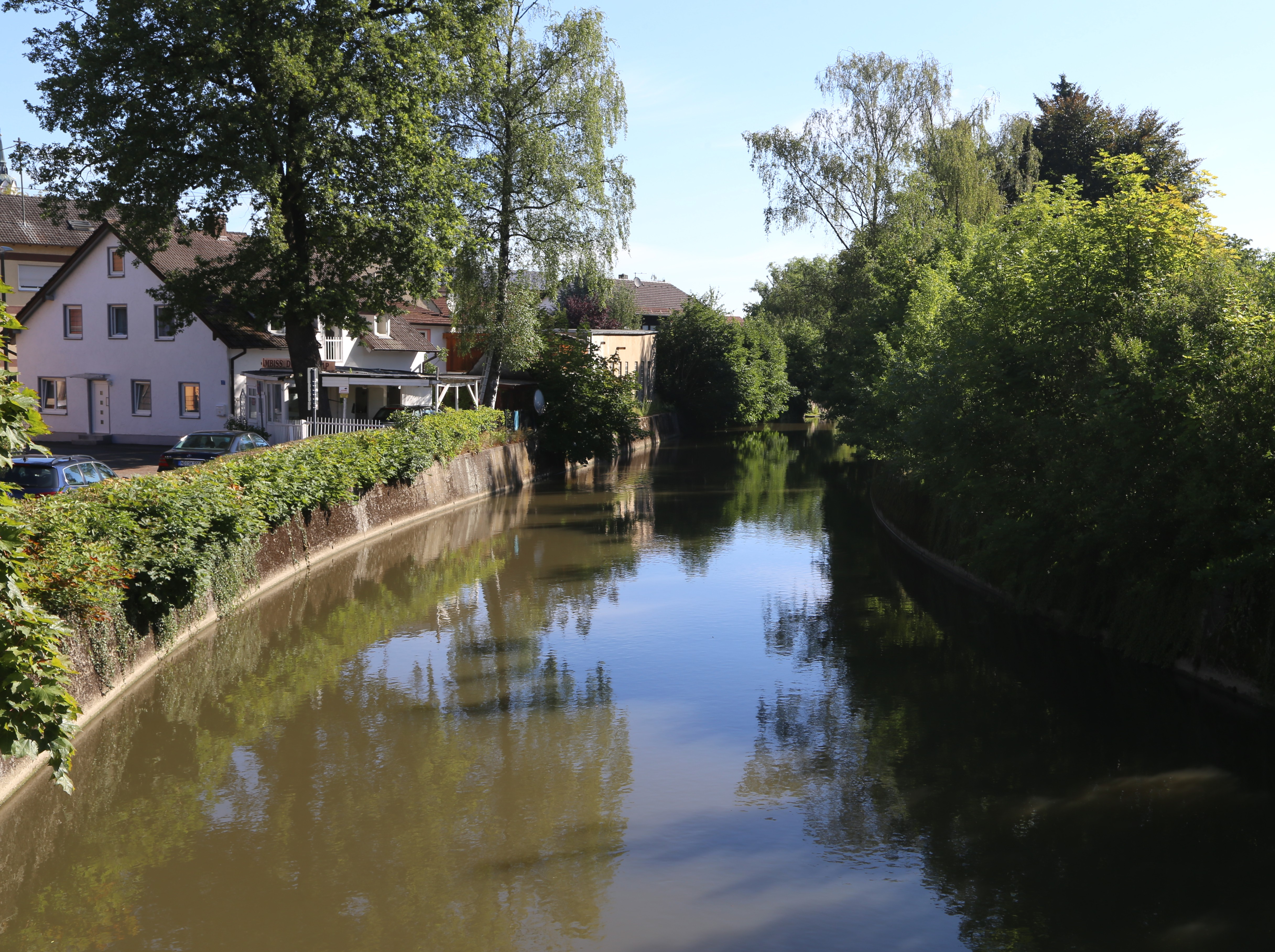 Der Fluss Paar unterhalb der Aichacher Straße, Schrobenhausen